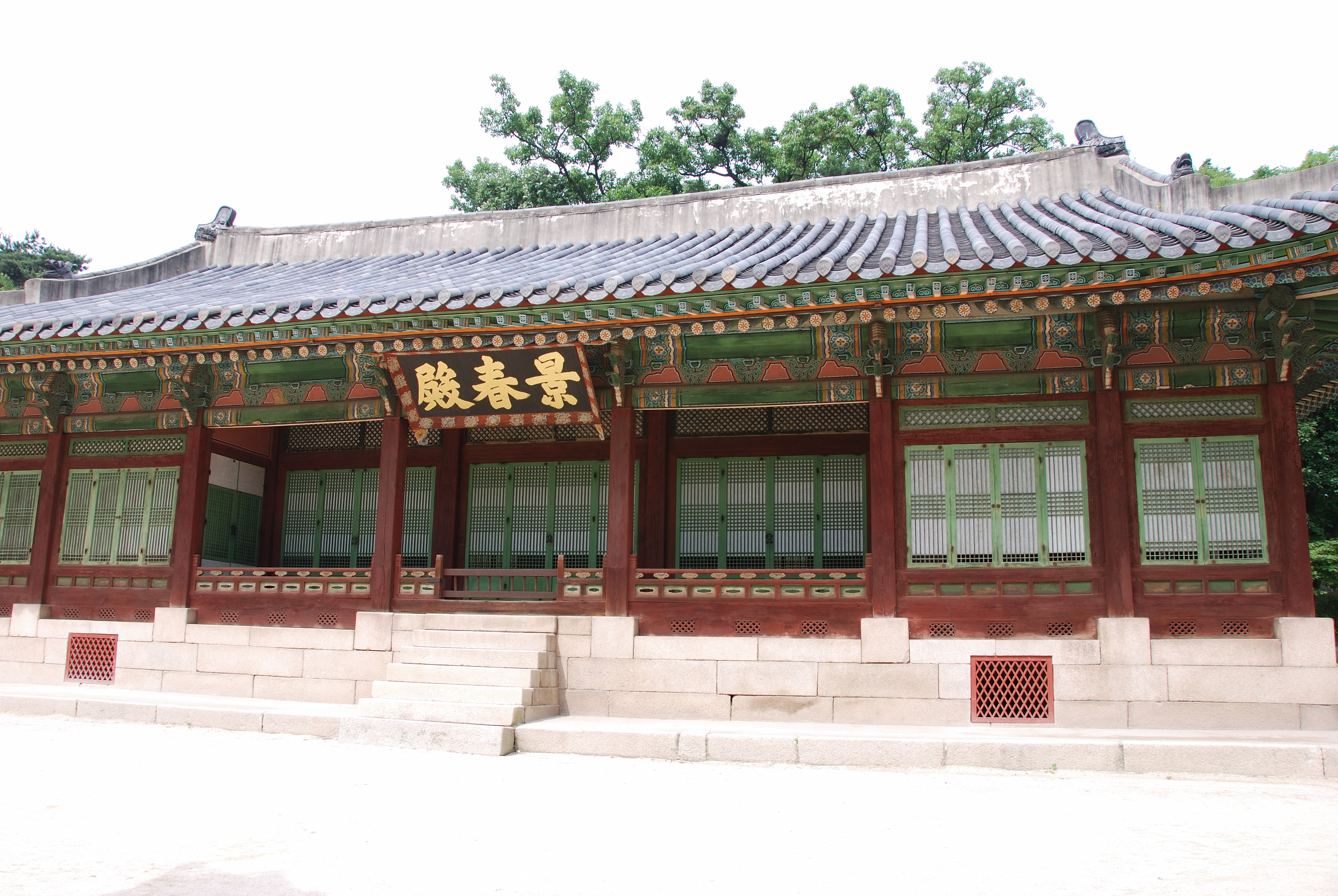 창경궁의 내전으로 성종 14년에 건립되었다. 그후 임진왜란 때 소실되었다가 광해군 8년에 재건하였으나, 순조 30년에 불탄 것을 그 34년에 다시 지어 오늘에 이른다. 이 경춘전은 정조와 헌종이 탄생한 곳이며, 현판은 순조의 어필이다.